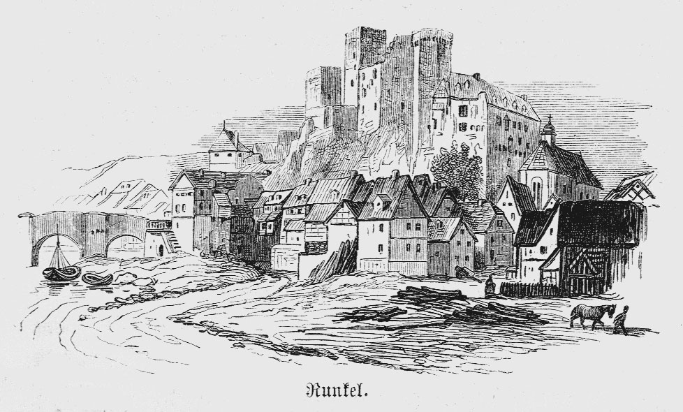 „Ansicht von Burg und Stadt Runkel, um 1865“; Radierung auf Papier/Schwarz-Weiß